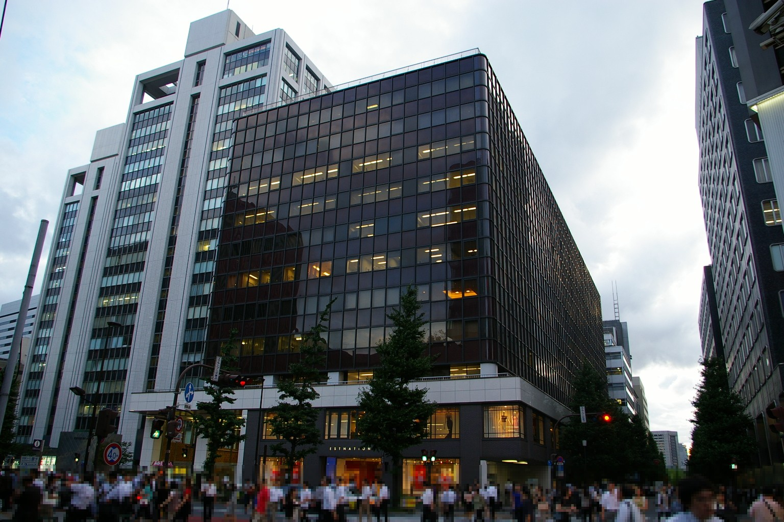 2009年7月、東京都有楽町駅前で撮影。 撮影者：火国男児